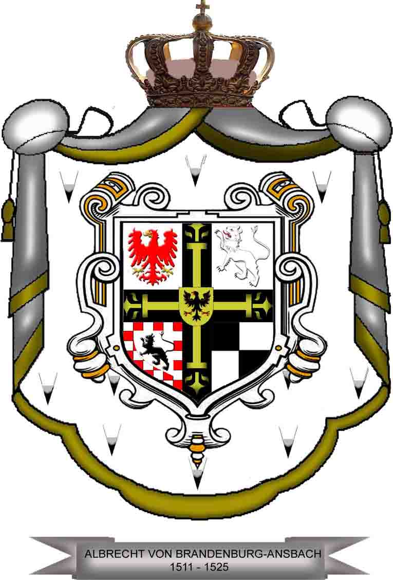 Brandenburgi Albert nagymesteri címere